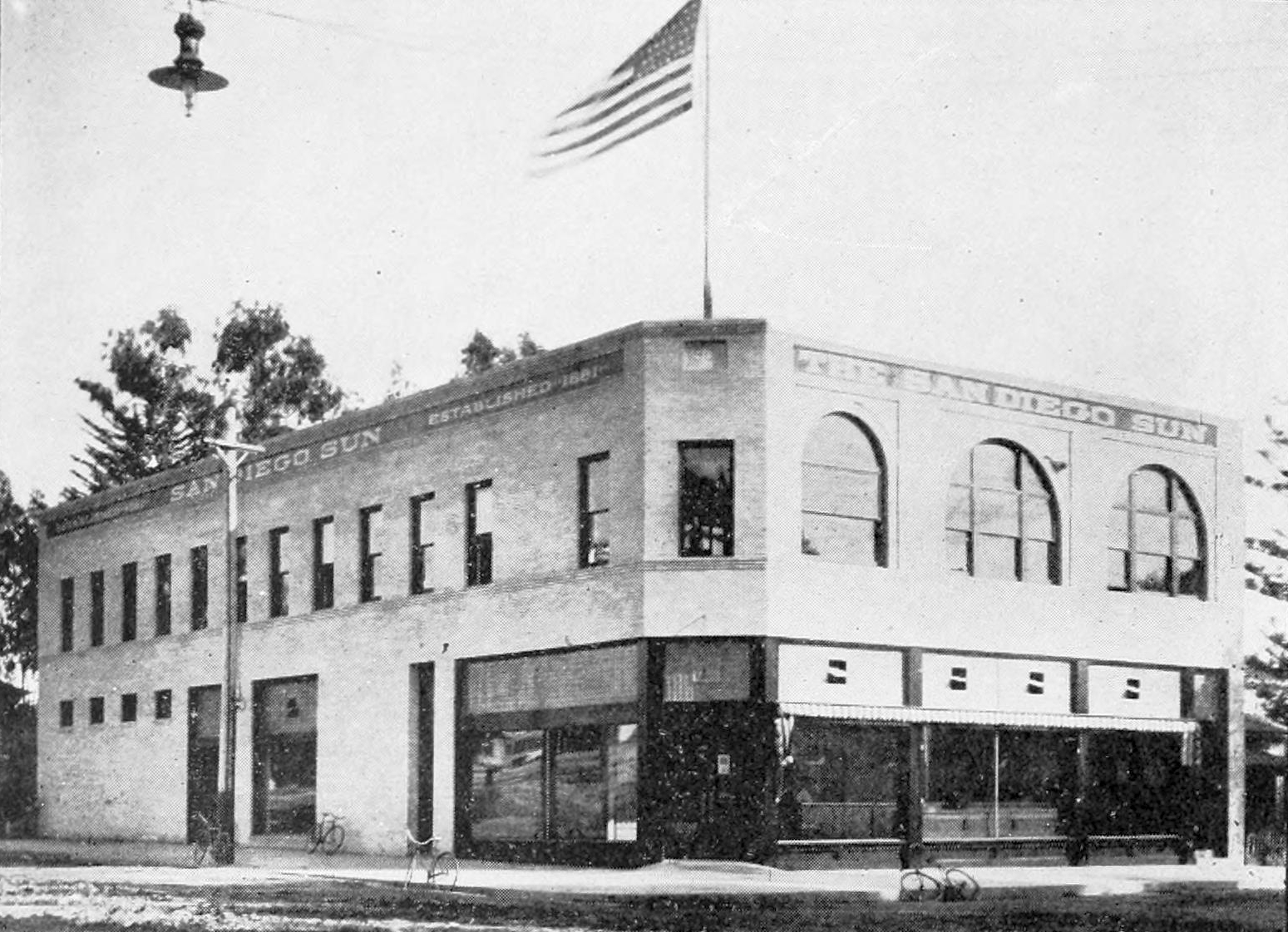 San Diego Sun newspaper building